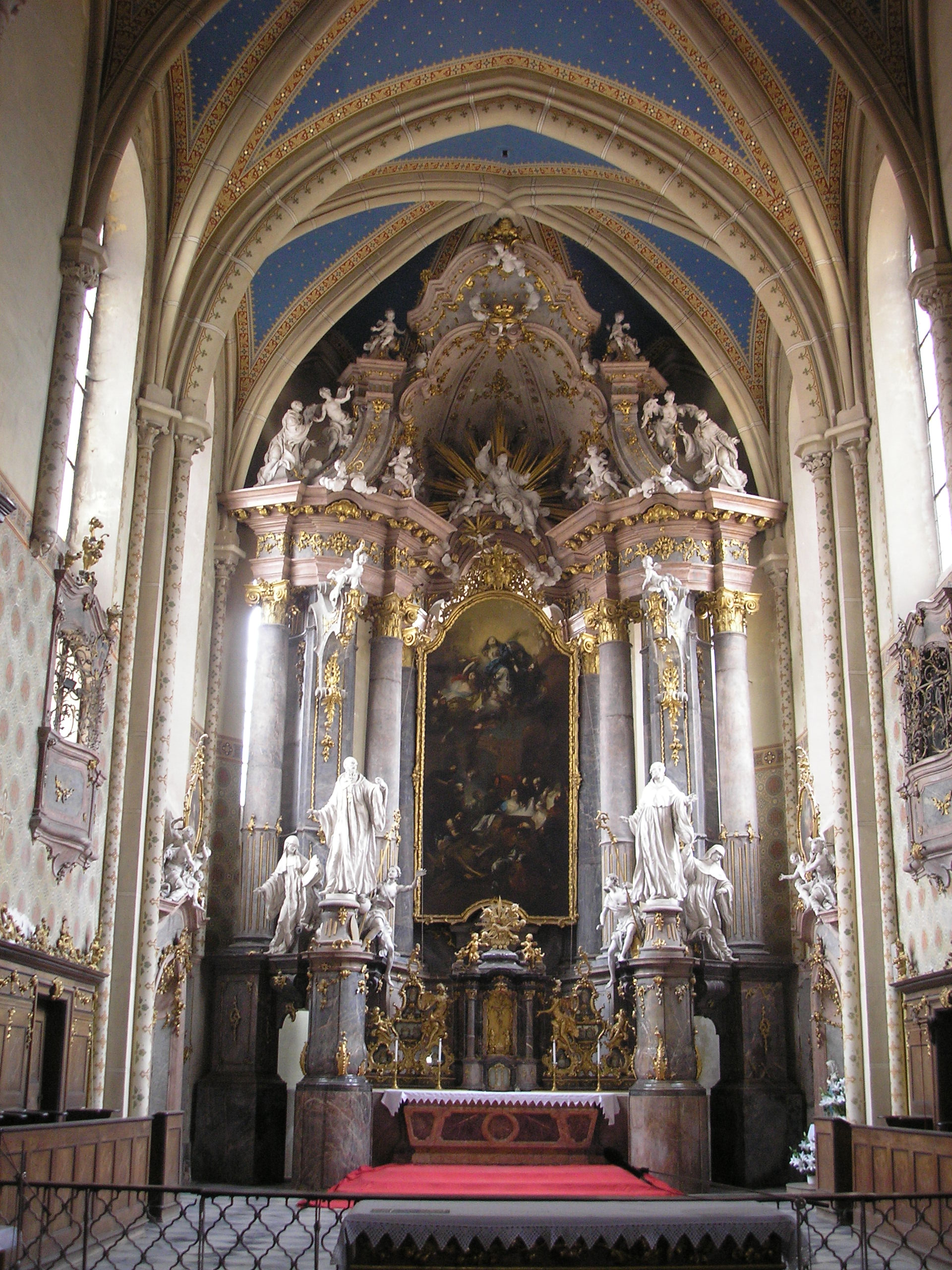 Innenraum des Klosters Porta Coeli